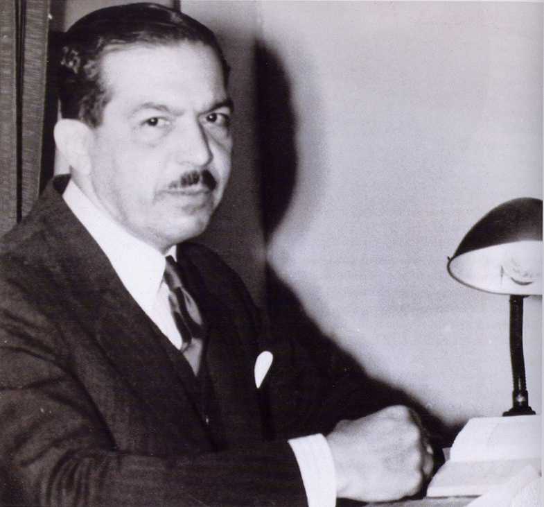 Pedro Henríquez Ureña durante una conferencia en 1930.